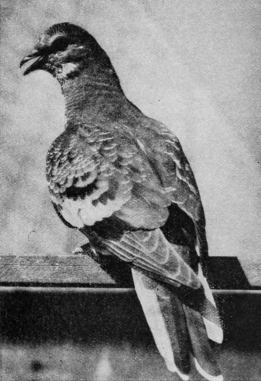 Immature Passenger pigeon.